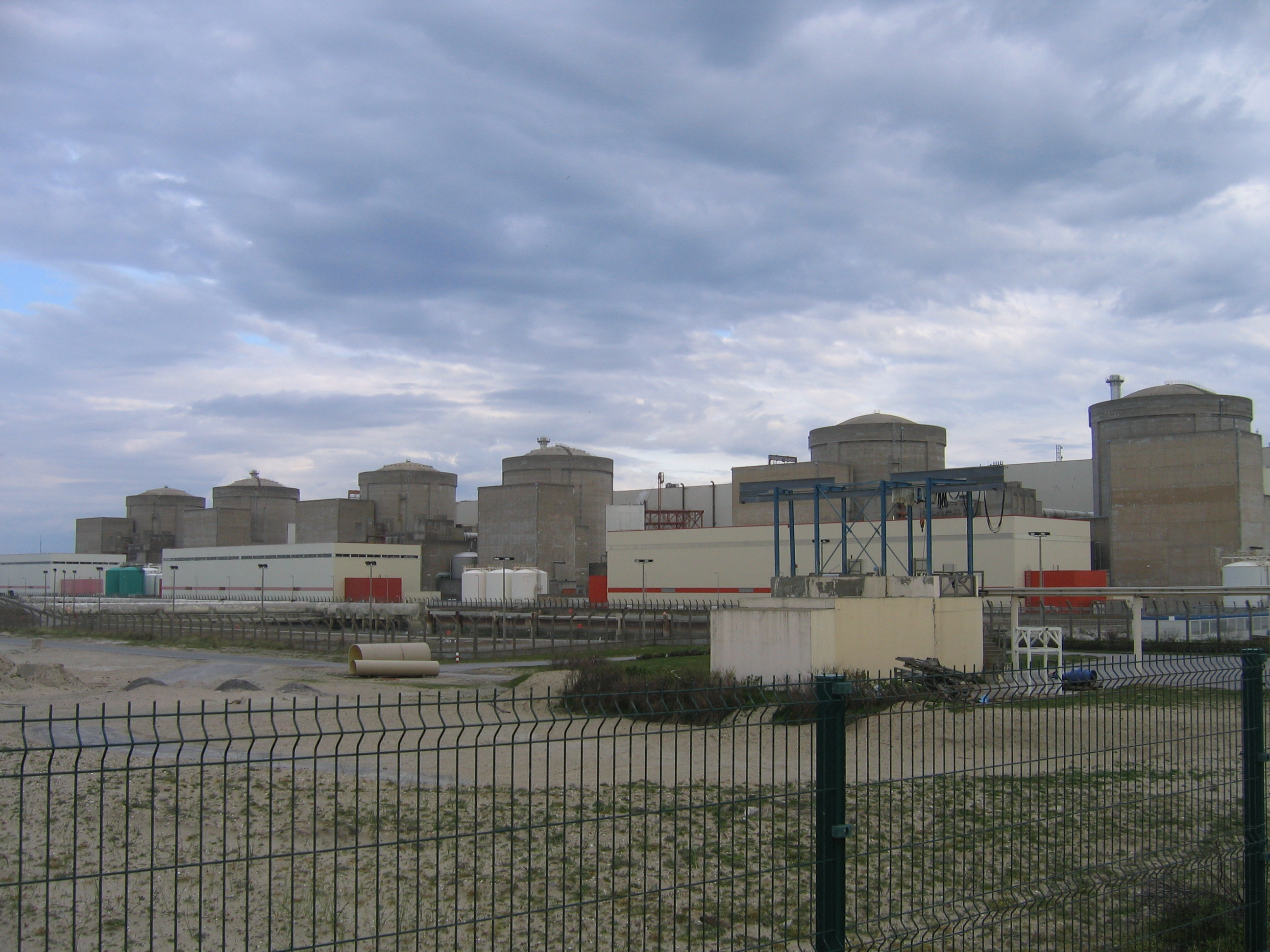 Centrale nucléaire de Gravelines avec ses 6 réacteurs dans leurs enceintes de confinement en béton